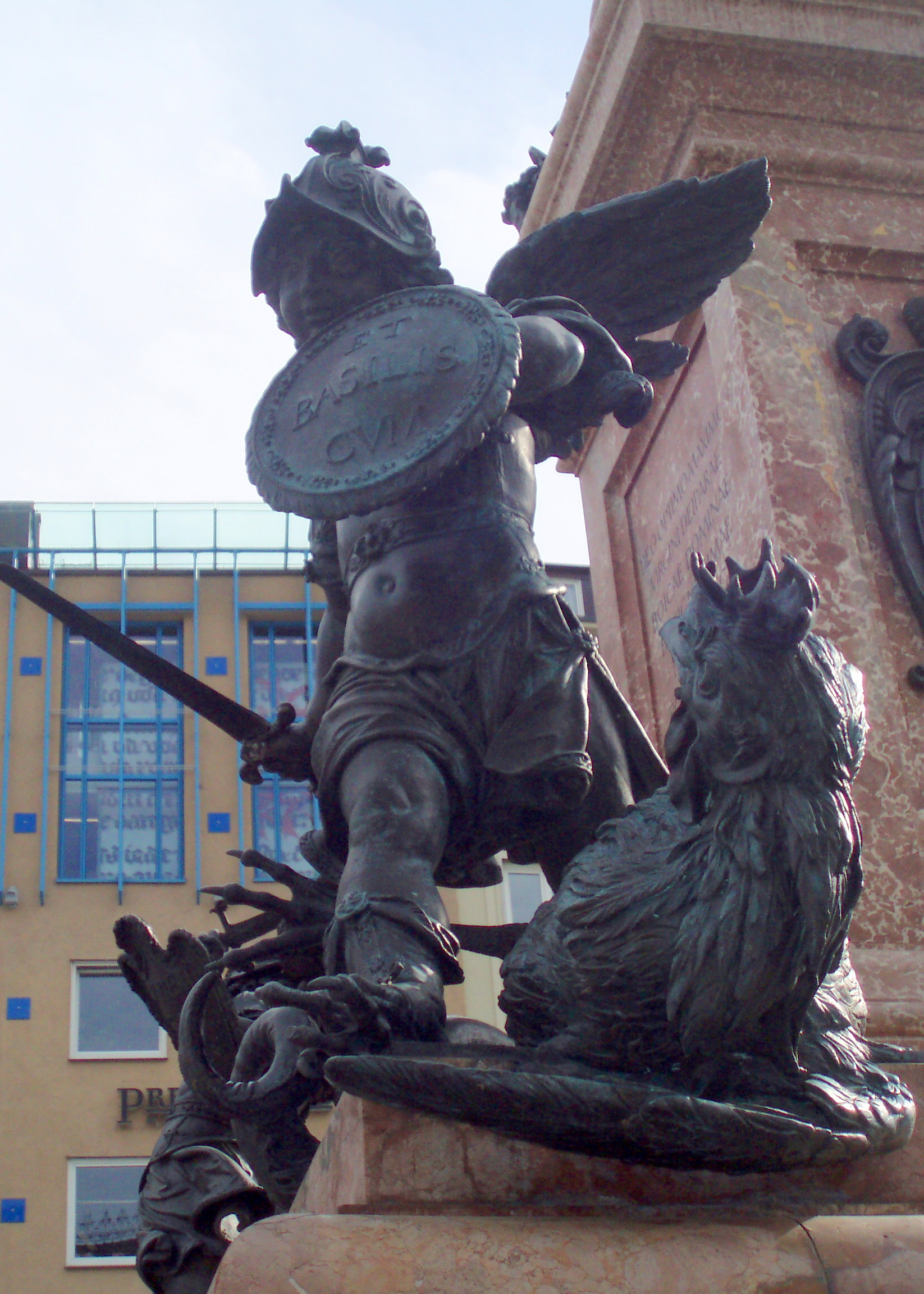 Beeld in Munchen van een basilisk die verslagen wordt door een engel. (English=A putto kills a basilisk, symbolic of Swedish occupiers and Protestant heresy, on the Mariensäule, Munich, erected in 1638.)